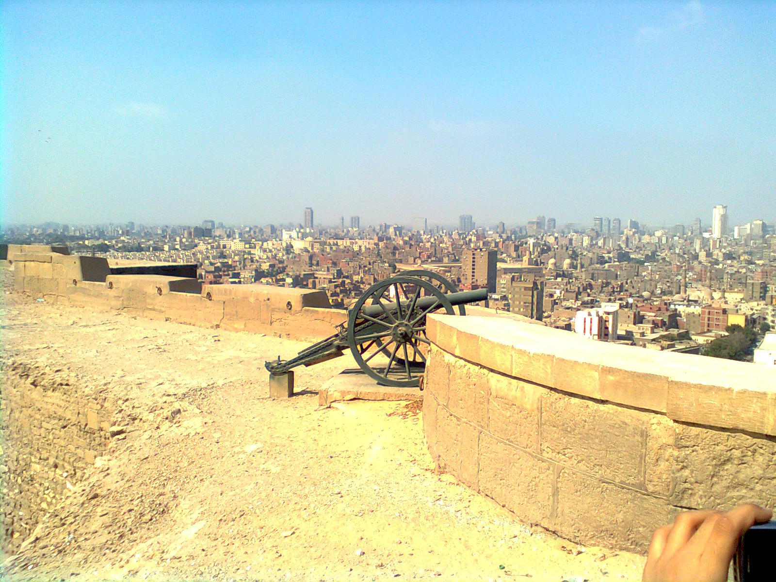 سور مصر القديمة من داخل قلعة صلاح الدين الأيوبى